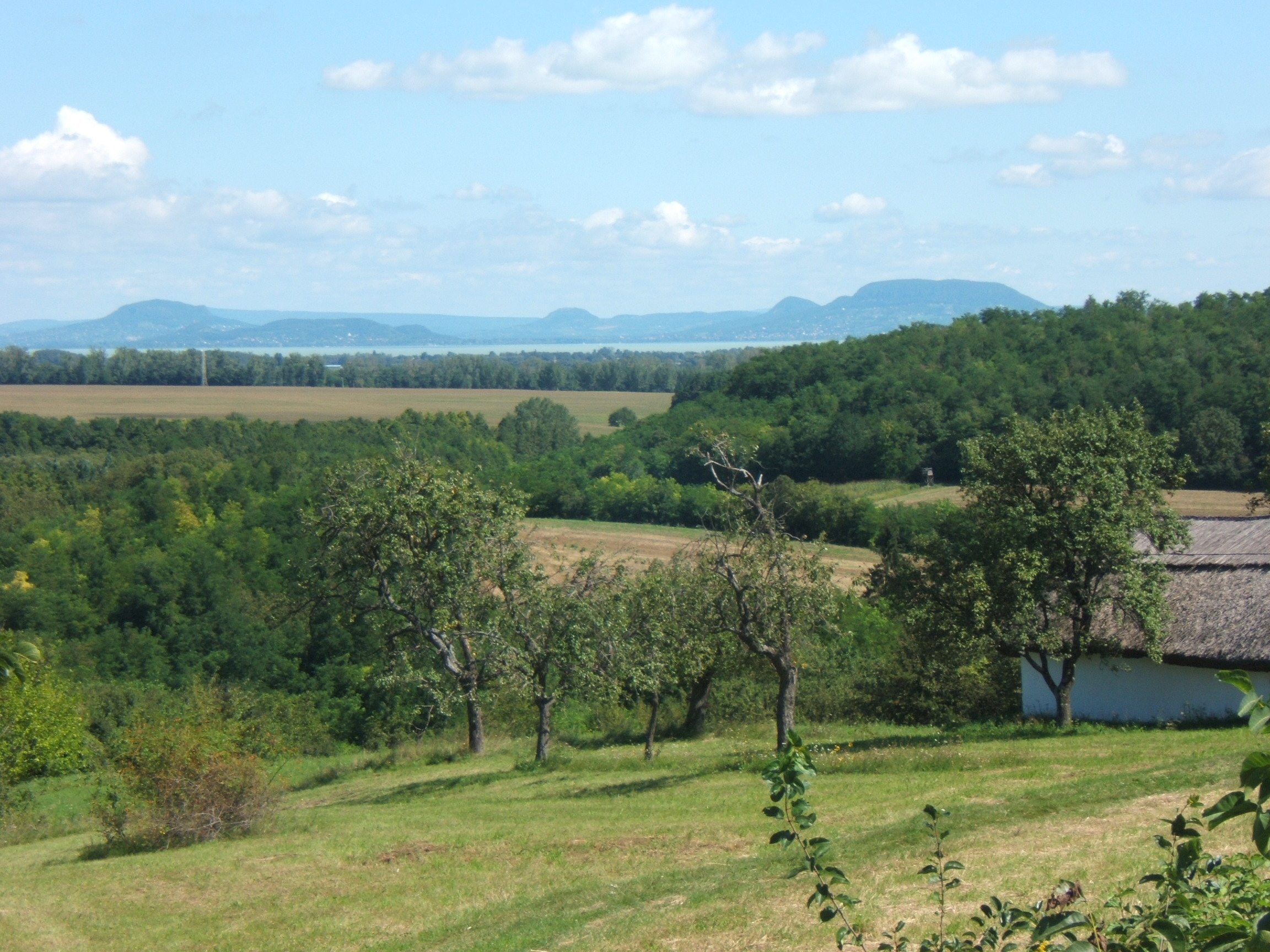 Kilátás a kéthelyi szőlőhegyről